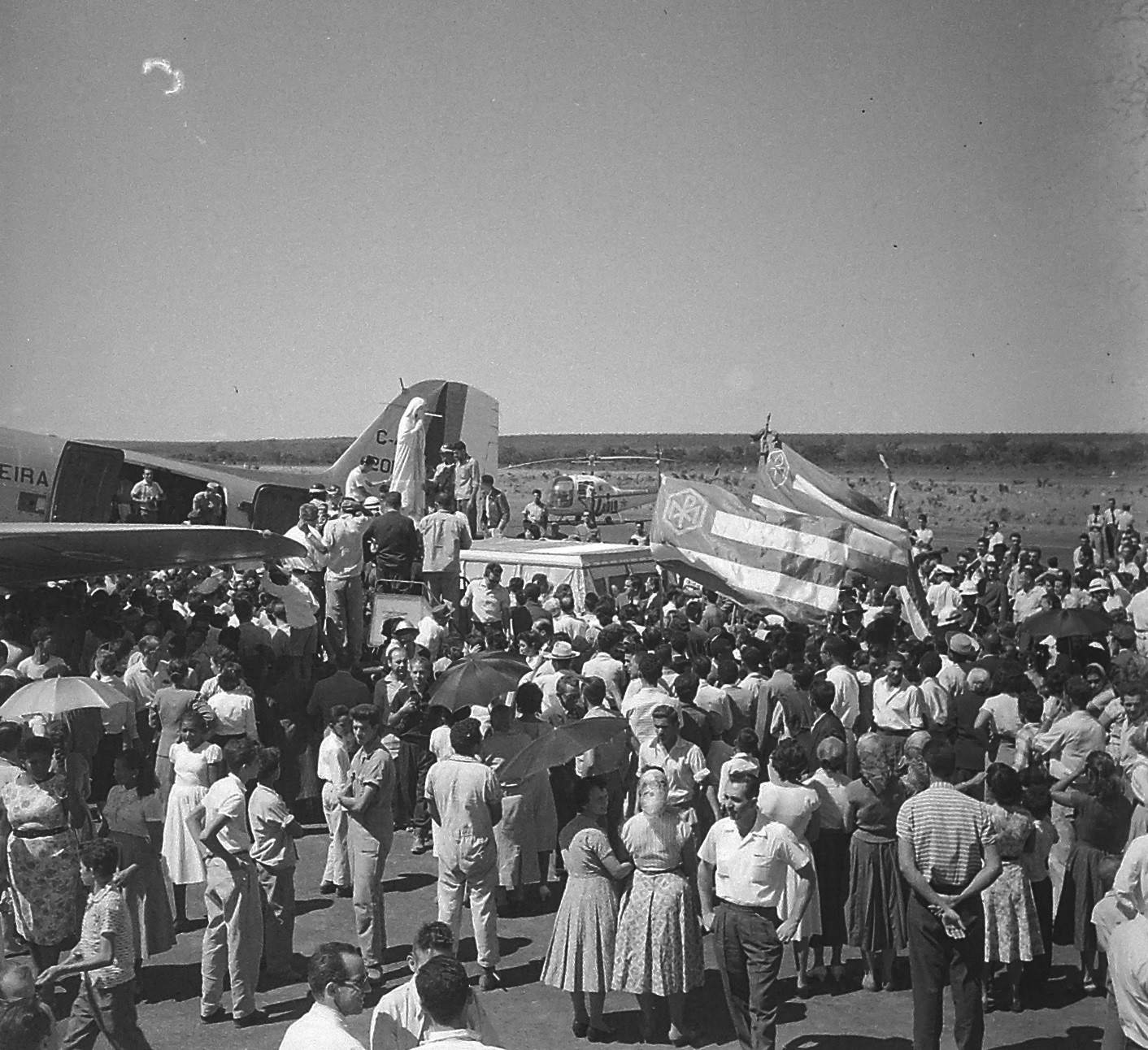 Imagem do Fundo Agência Nacional, do Arquivo Nacional